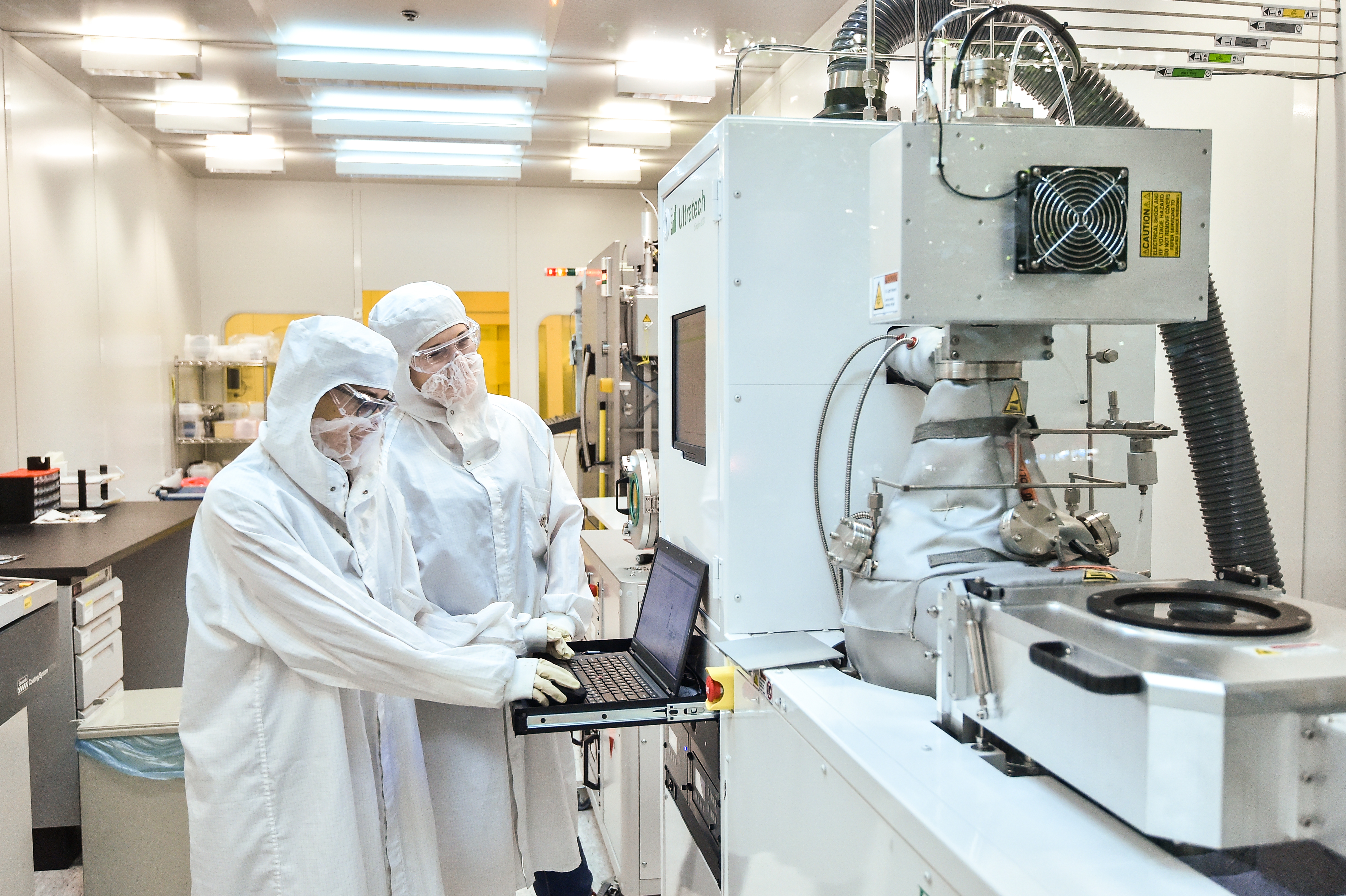 חדרים נקיים ומעבדות בבניין ננו אלקטרוניקה בפקולטה להנדסת חשמל בטכניון